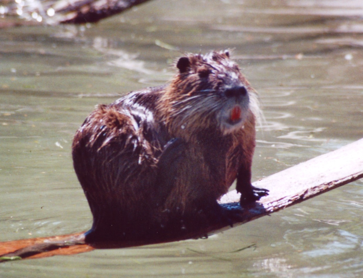 Nutria im Wildpark Poing